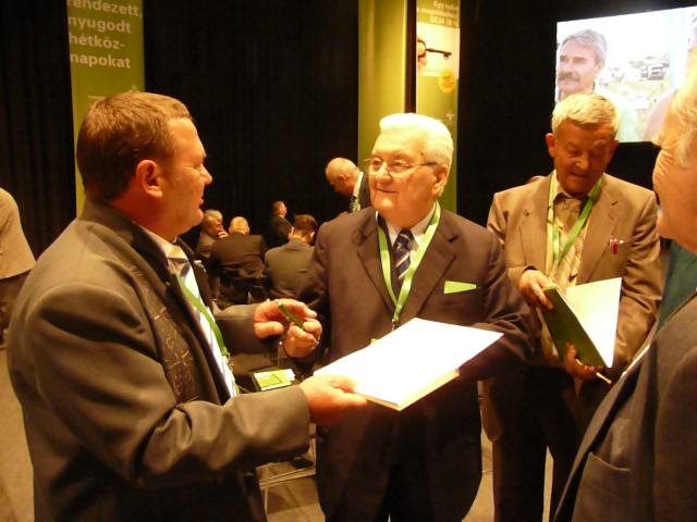 A Magyar Demokrata Fórum 2008. SZEPTEMBER 27-én, szombaton tartotta XXII. Országos Gyűlését. A Fórum 1987. SZEPTEMBER 27-en, AZ Első lakiteleki találkozón alakult Meg, akkor MEG mozgalomként. Boross Péter. A felvétel megjelent Creative Commons alatt a Metapolisz DVD sorozatban.